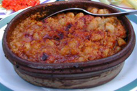 Познато традиционално македонско јадење тавче гравче.